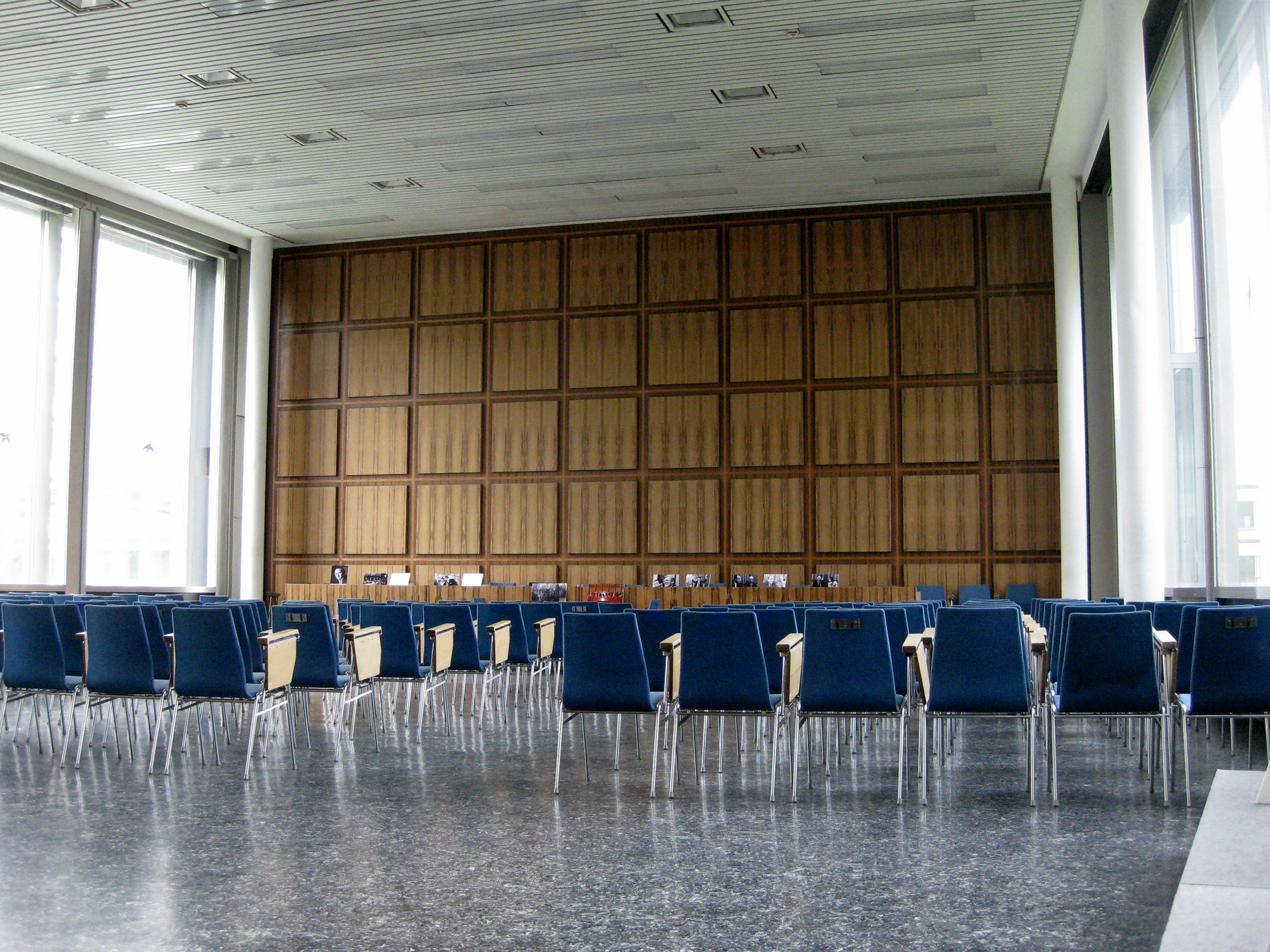 Bonn, Saal der Bundespressekonferenz (1968–1999) im Tulpenfeld 7 in Bonn-Gronau; seinerzeit bekannt als „Pressehaus“. Charakteristisch ist die Wandverkleidung aus Palisanderholz.